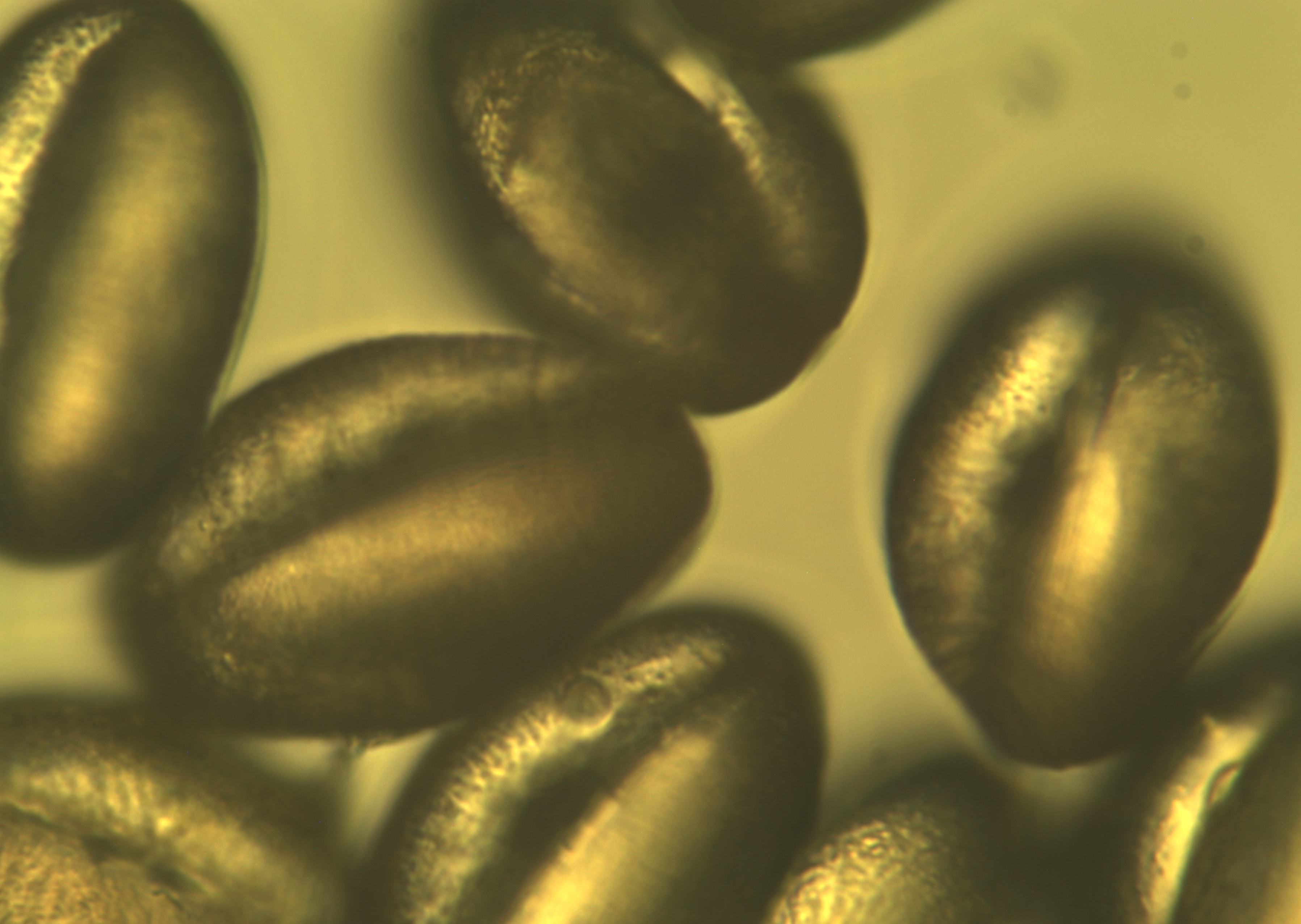 Gerbera Pollen 400x